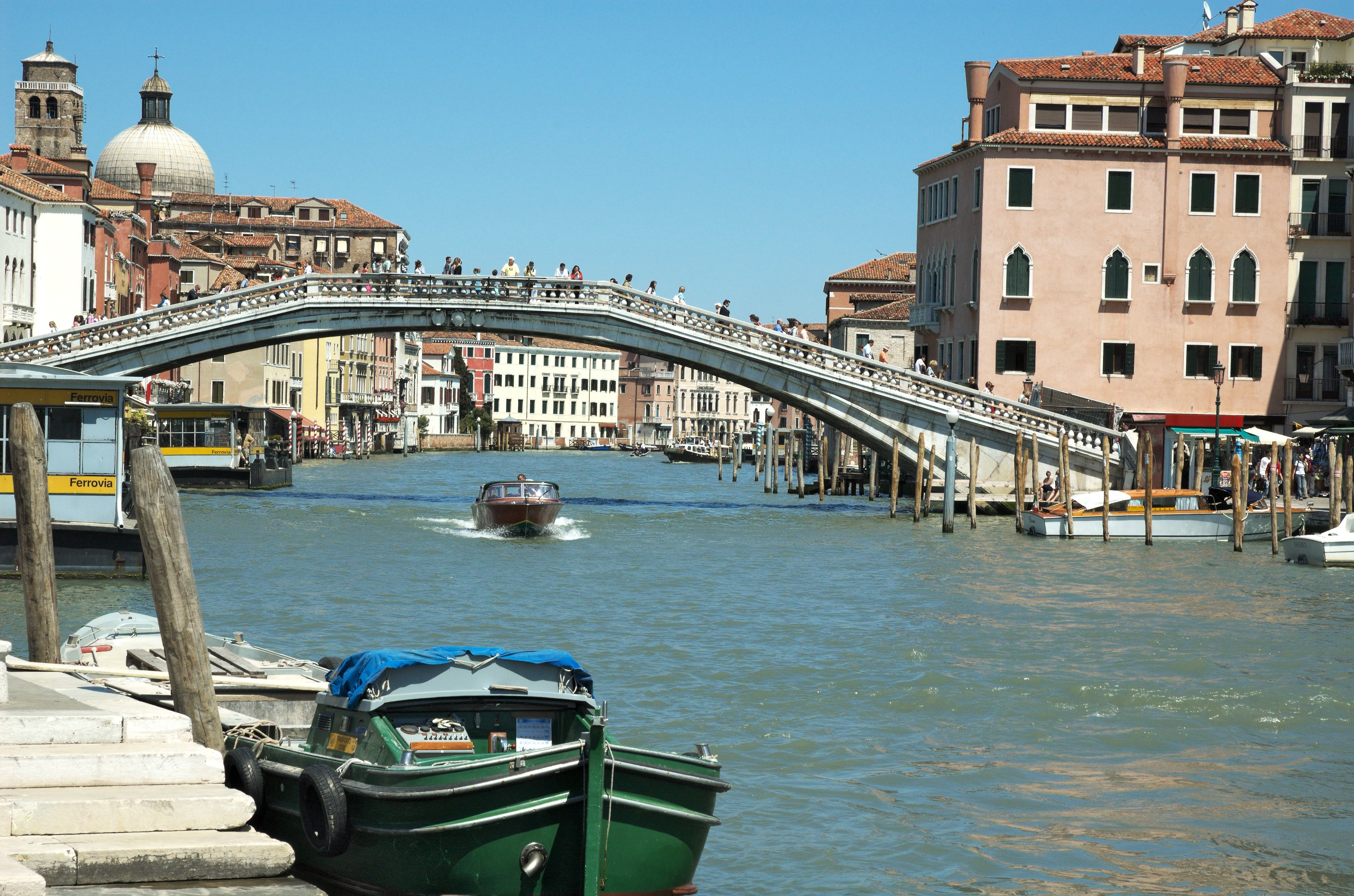 Ponte degli Scalzi, Venezia. Scalzi bridge over the Grand Canal, Venice.